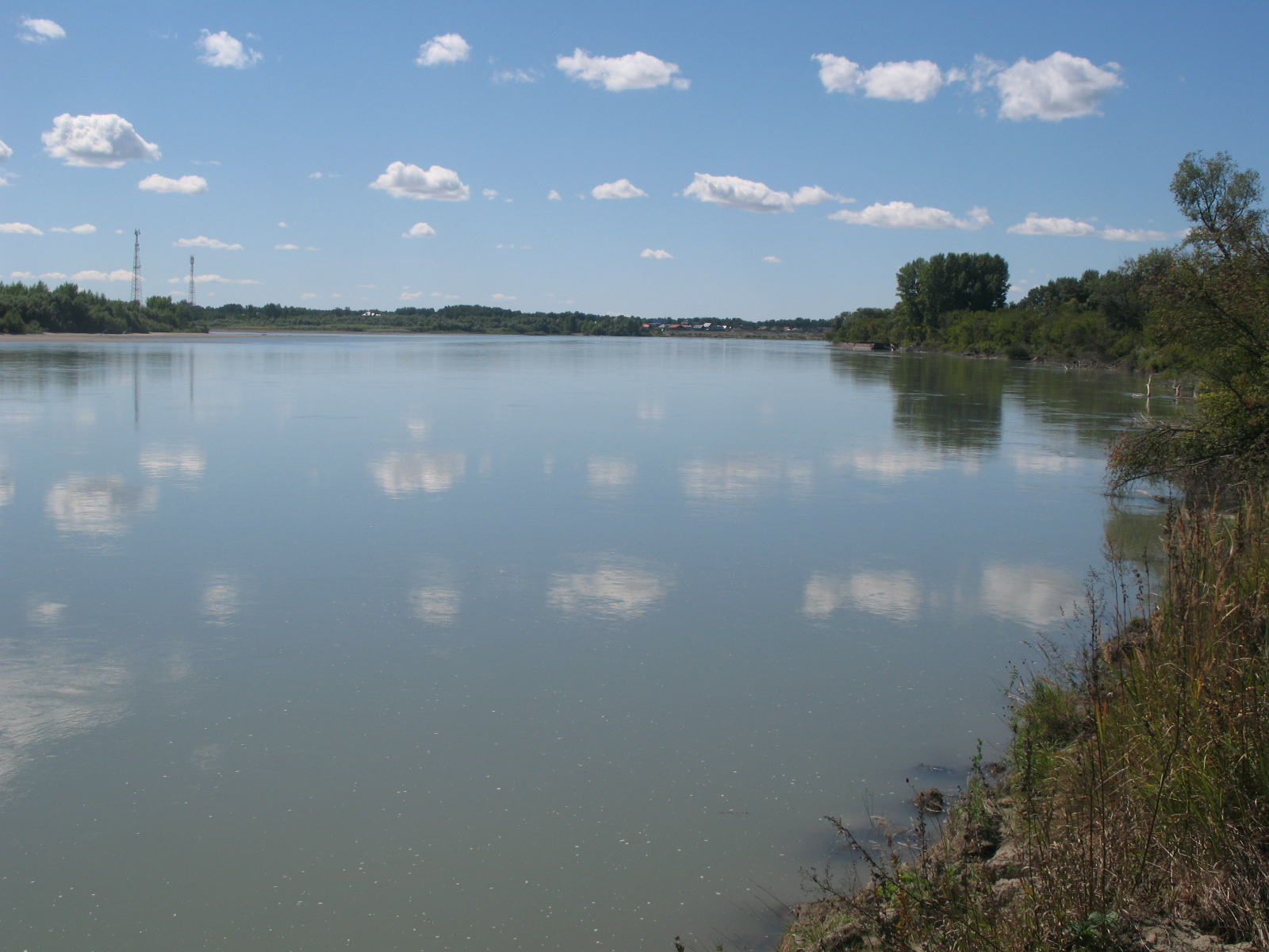 Катунь в нижнем течении, недалеко от слияния